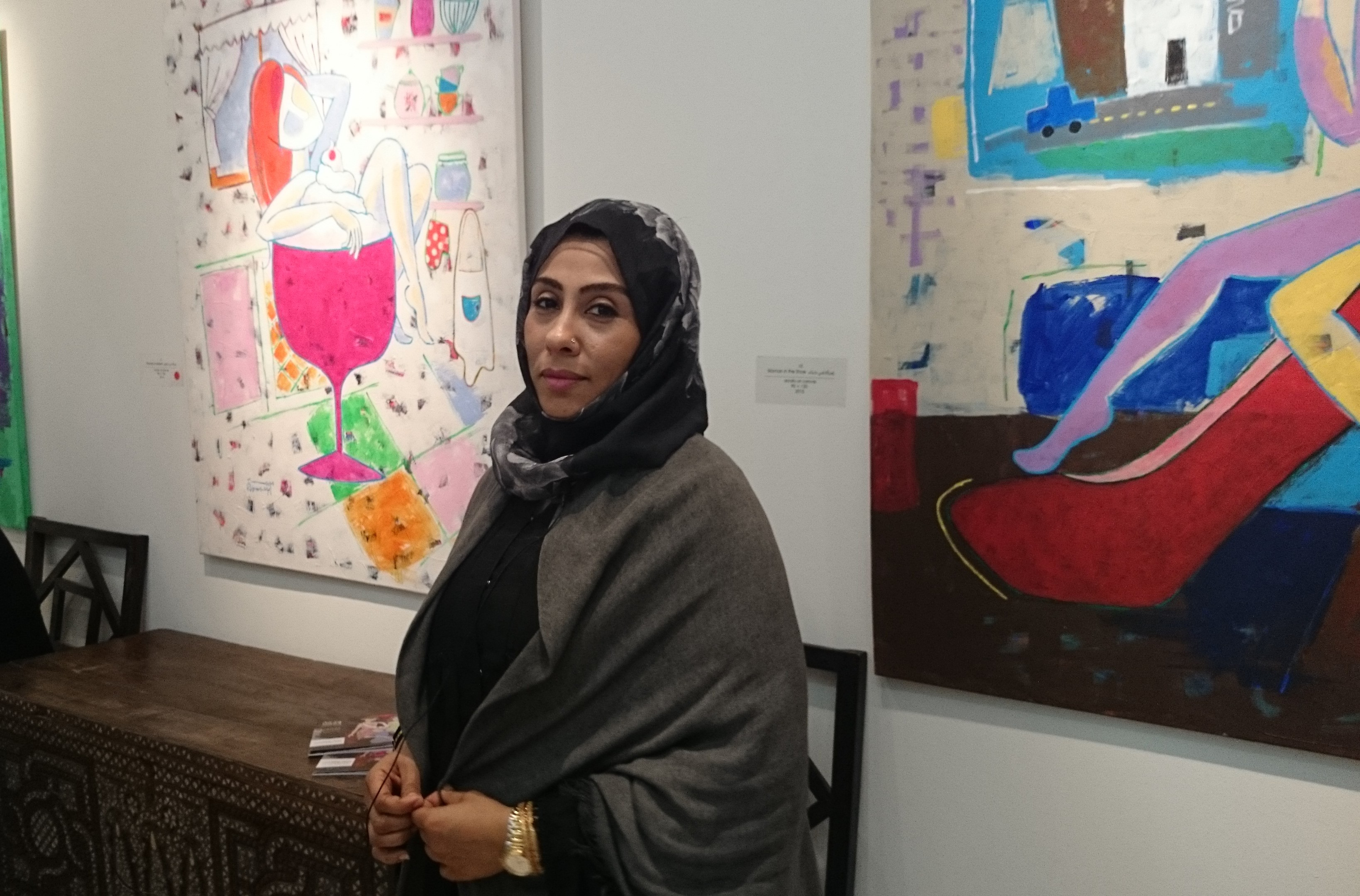 صورة ملتقطة بمعرض الفنانة مريم بوخمسين على صالة التراث العربي